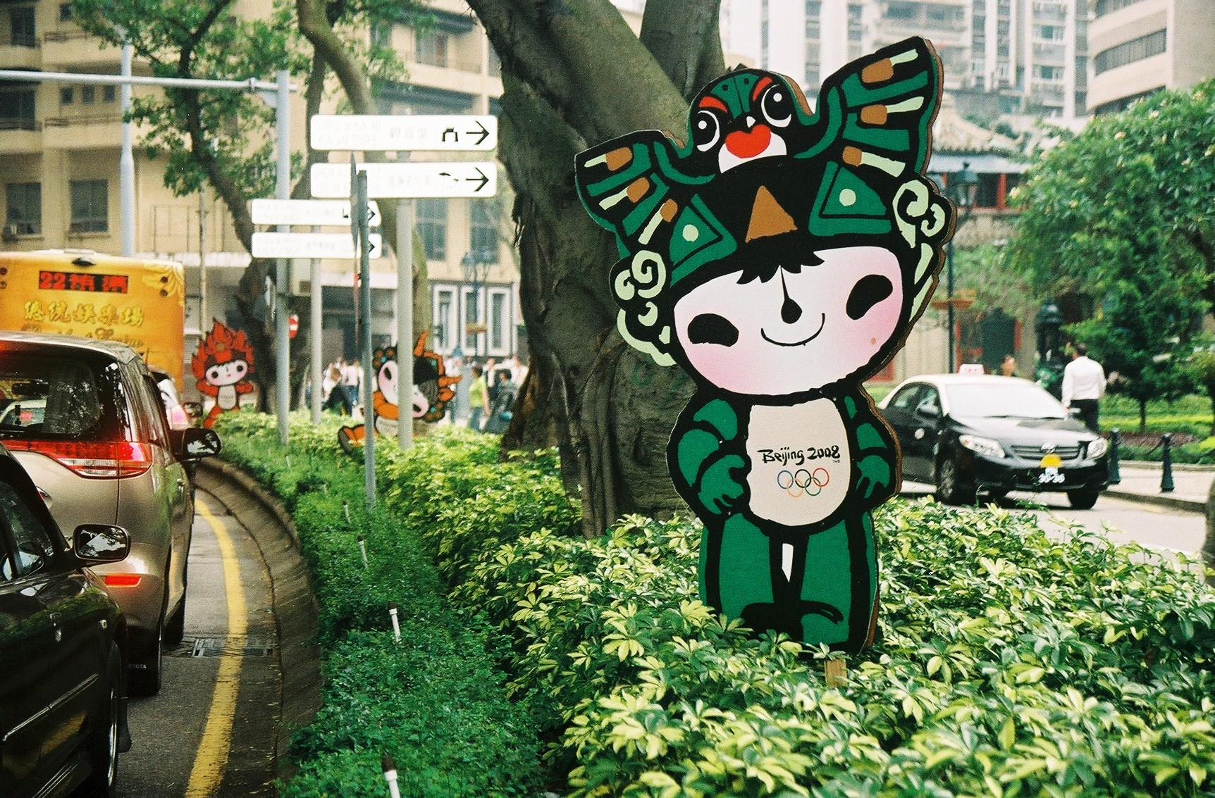 Fuwa in Macau